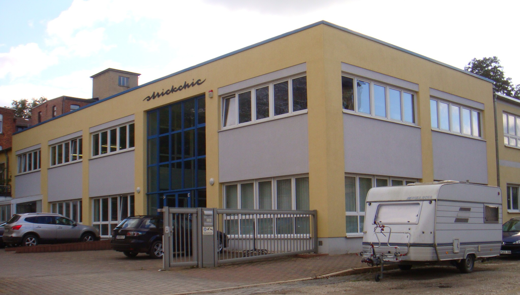 Strickchic Apolda